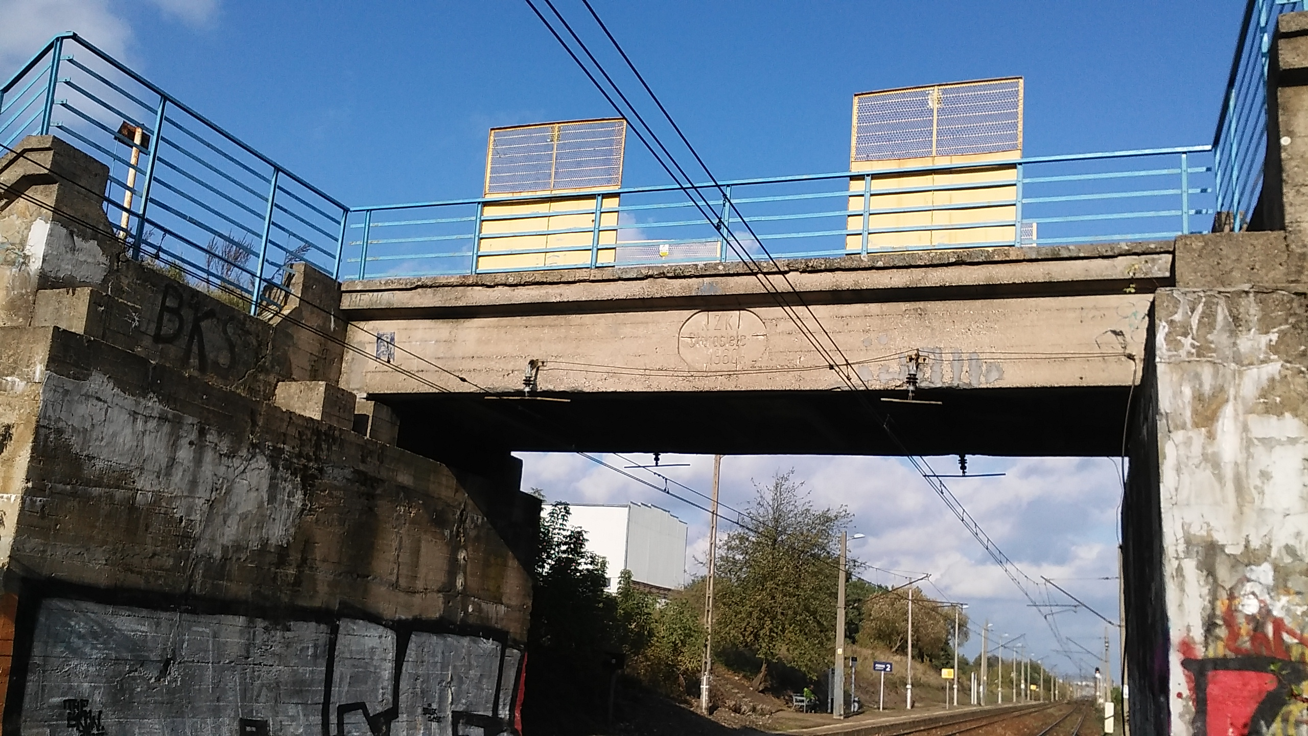 Przystanek kolejowy Białystok Wiadukt - wiadukt linii 515 nad przystankiem, napis: KZKS Starosielce 1960 r. (Kolejowe Zakłady Konstrukcji Stalowych)